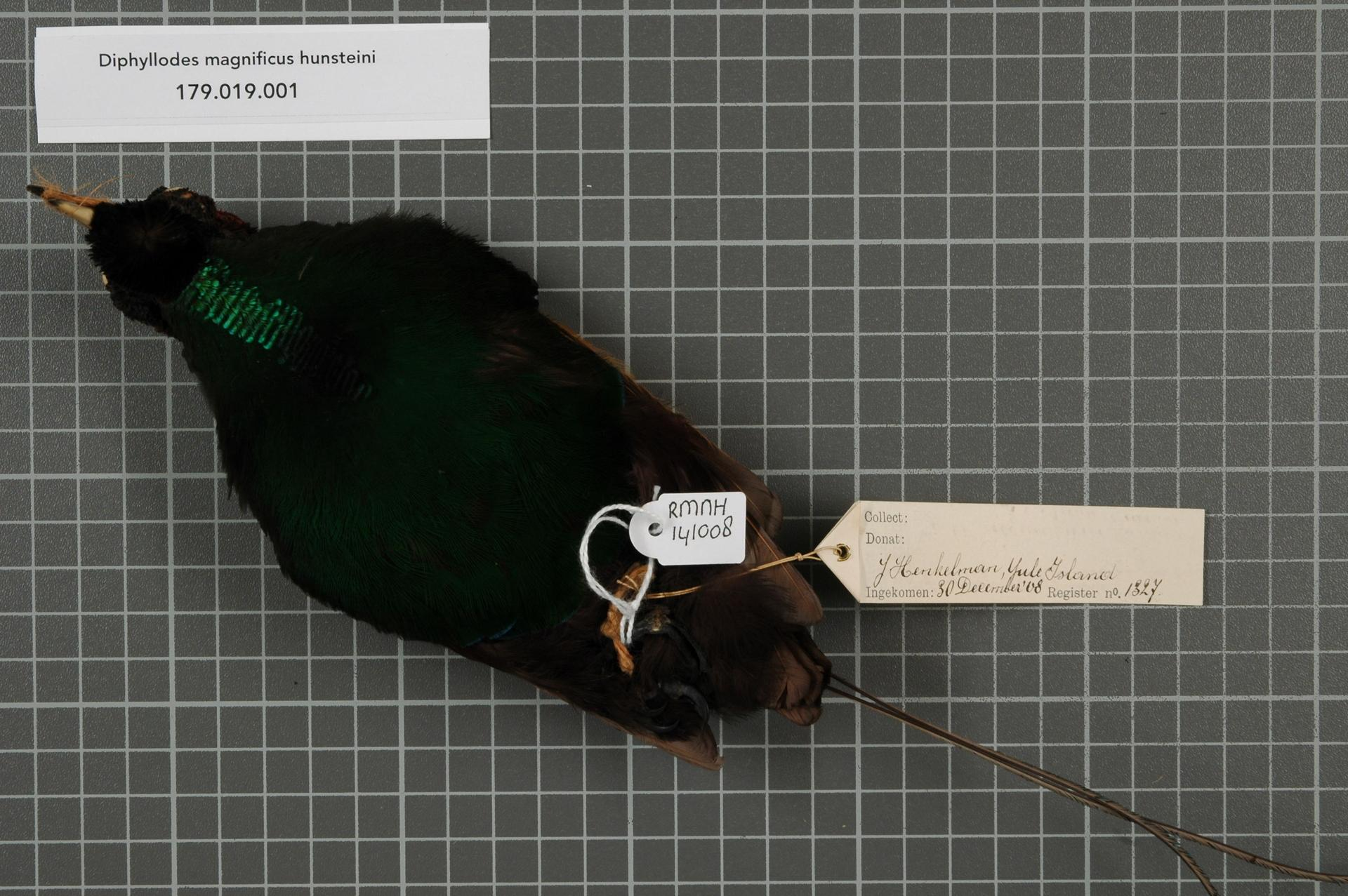 Diphyllodes magnificus hunsteini A.B. Meyer, 1885